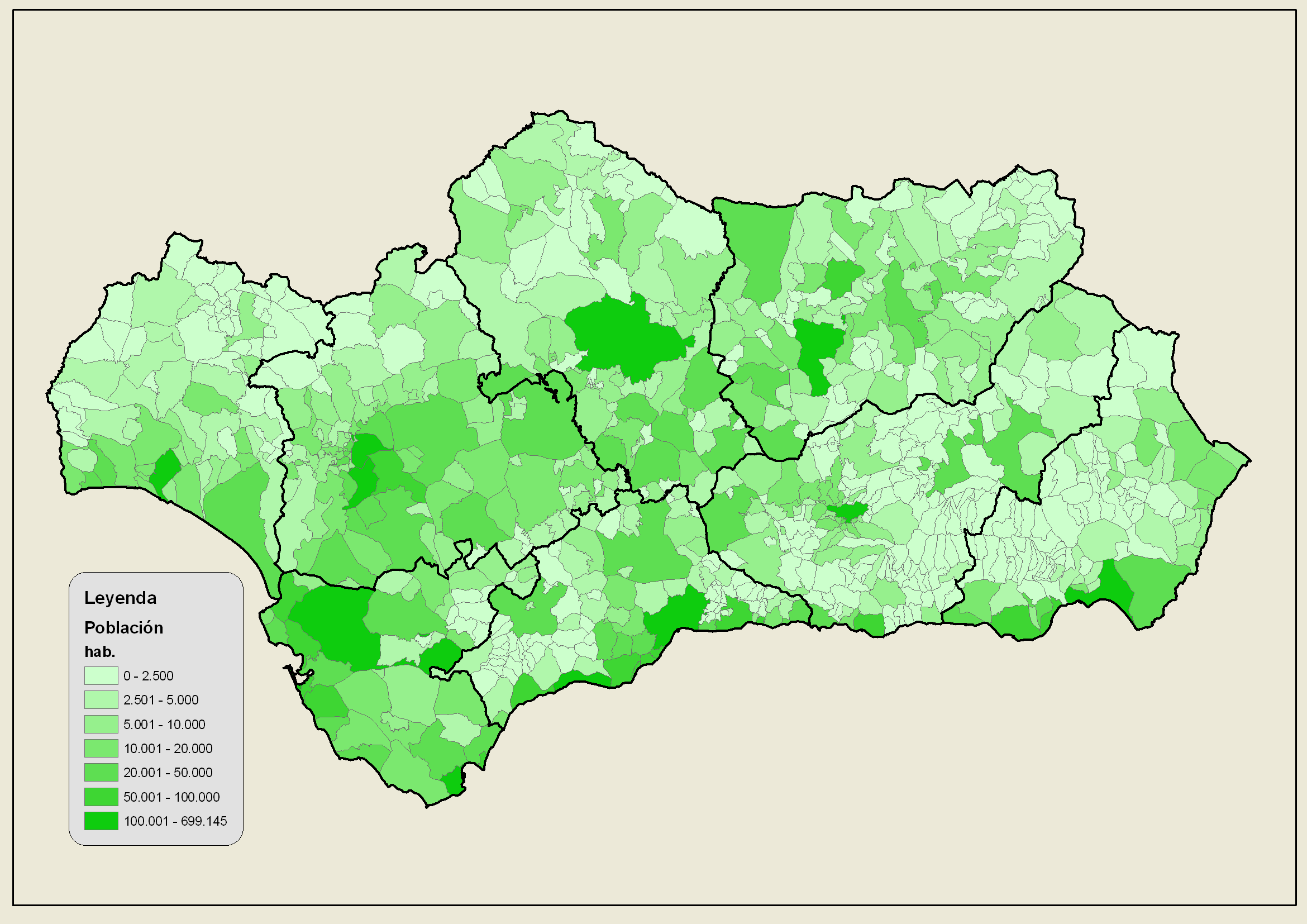 Población por municipios de Andalucía en el año 2007